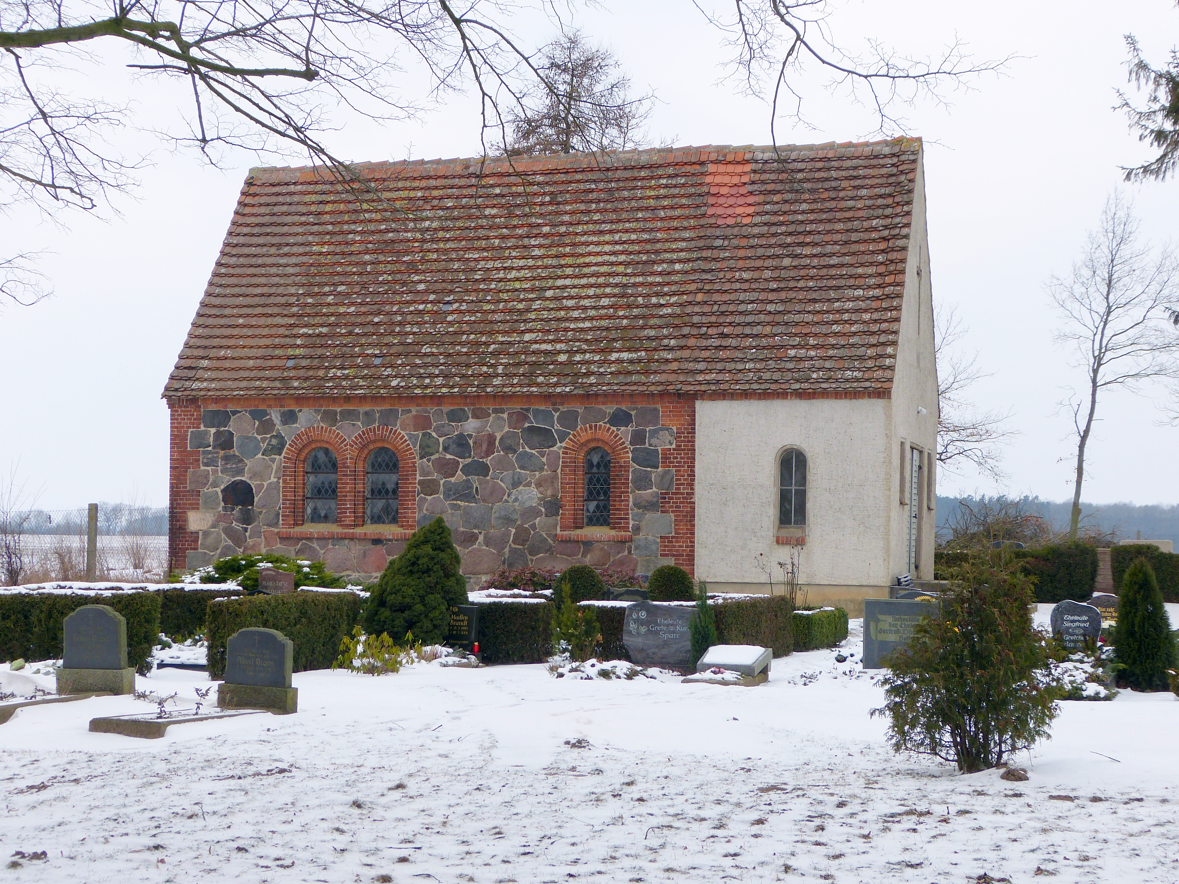 Kapelle in Leussin, Südostseite